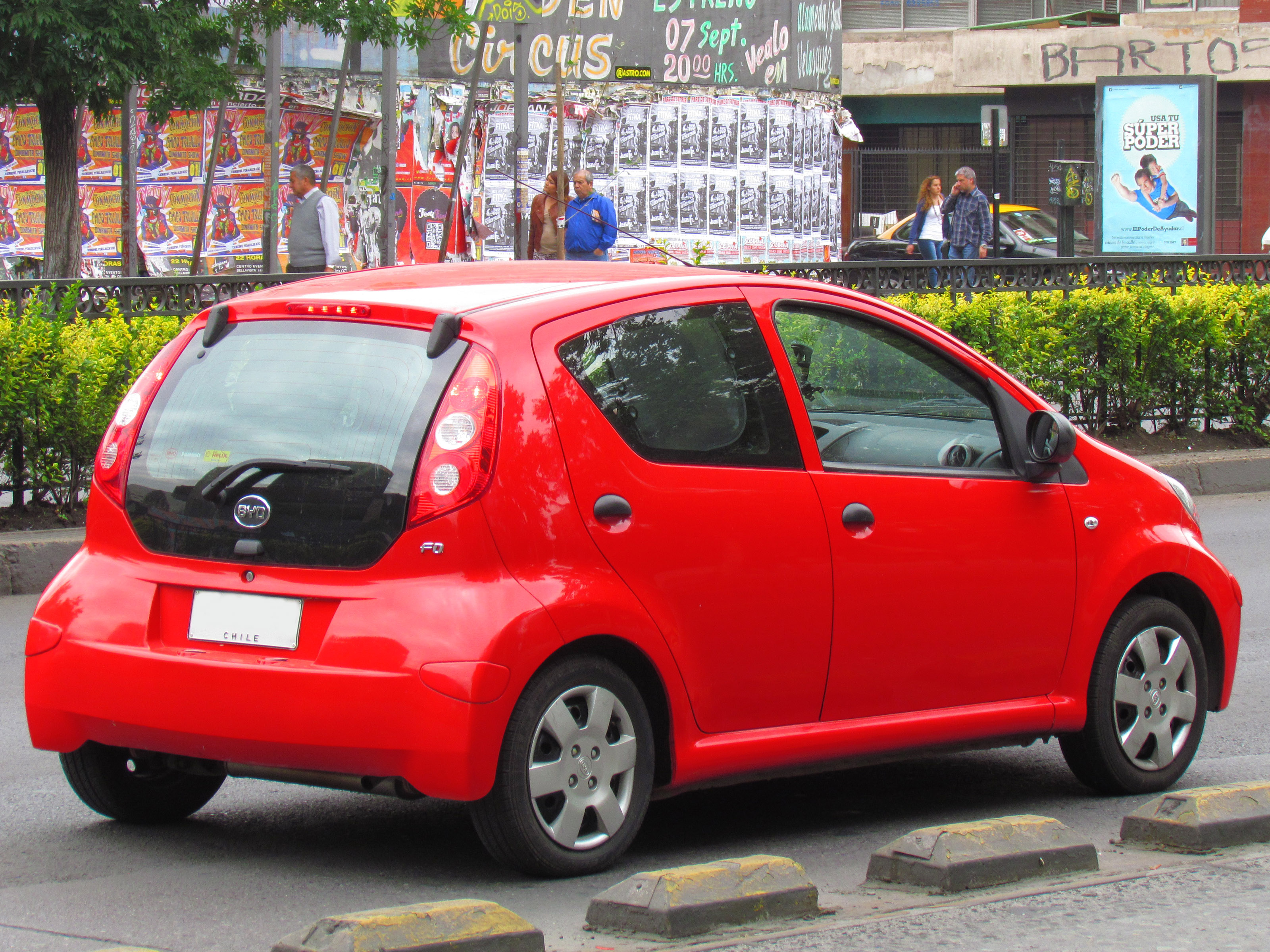 BYD F0 GLi 2012